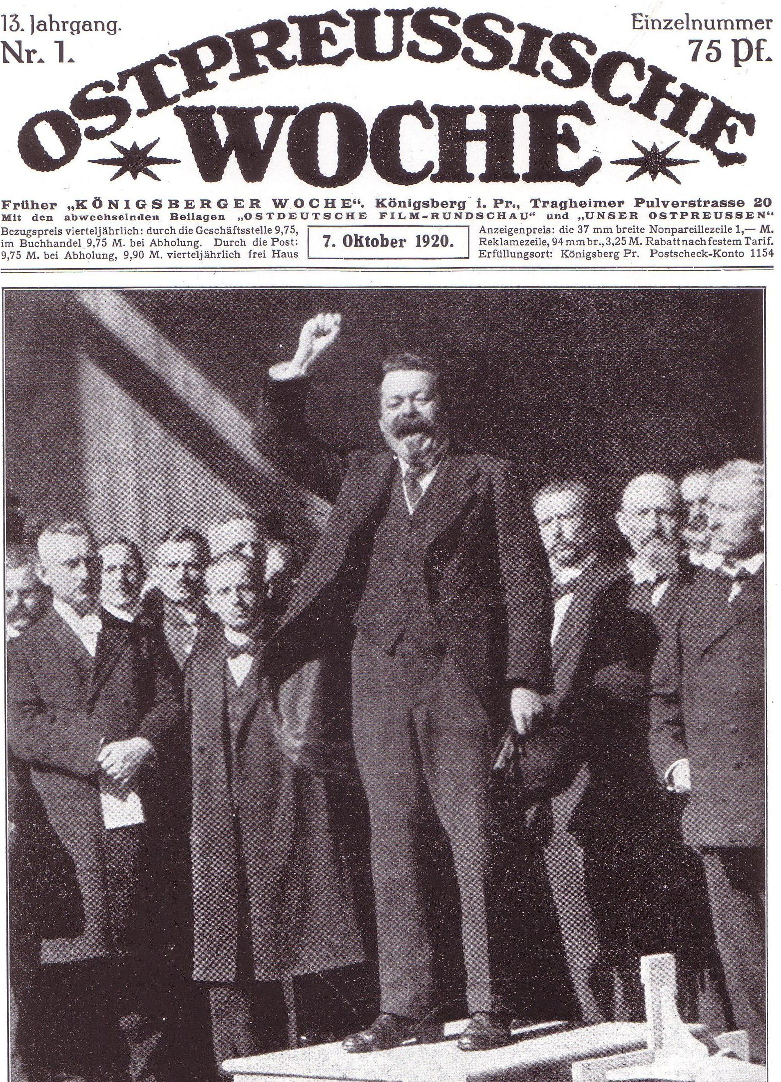 Reichspräsident Friedrich Ebert opening the Deutsche Ostmesse Königsberg